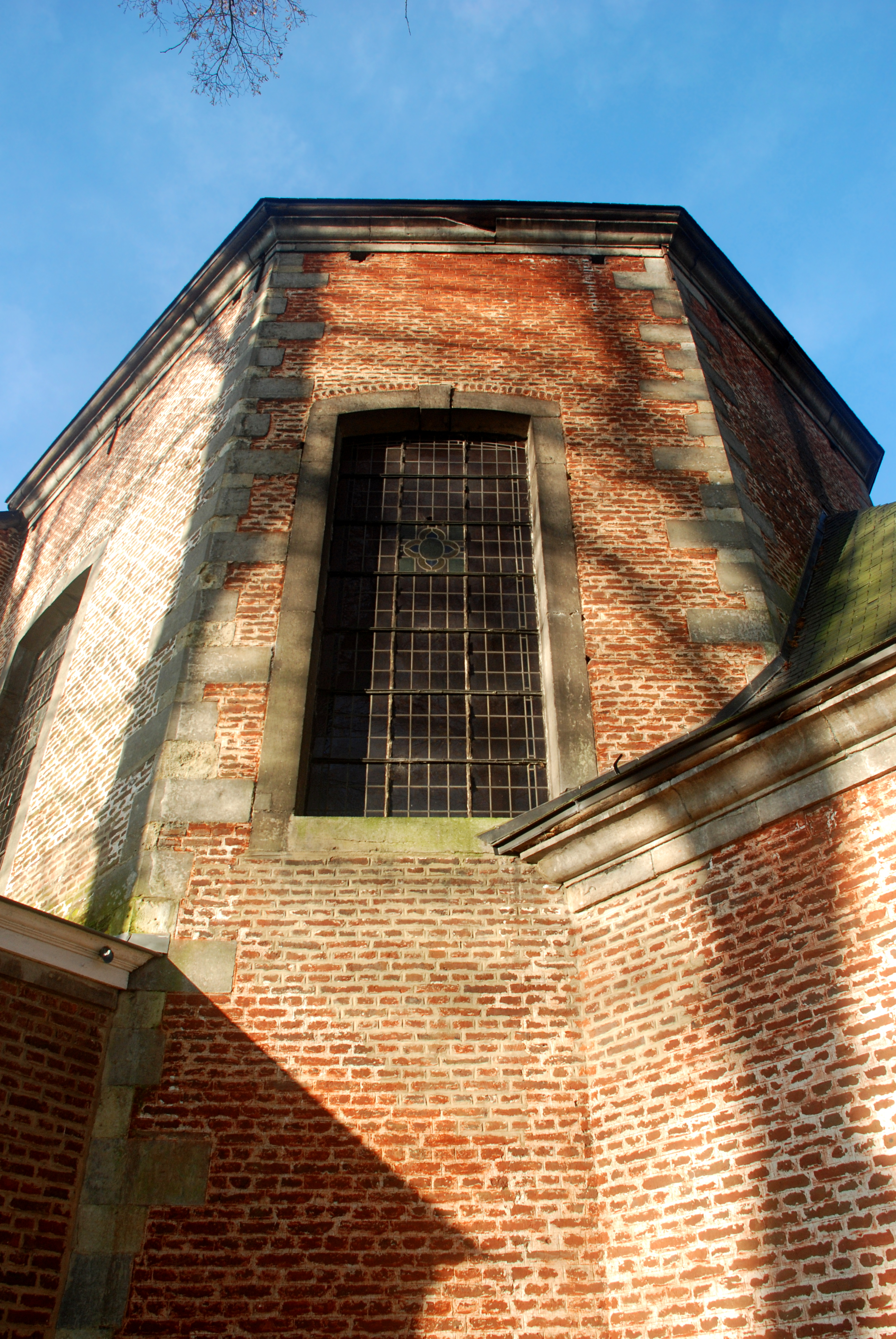 Belgique - Brabant wallon - Court-Saint-Étienne - Église Saint-Étienne